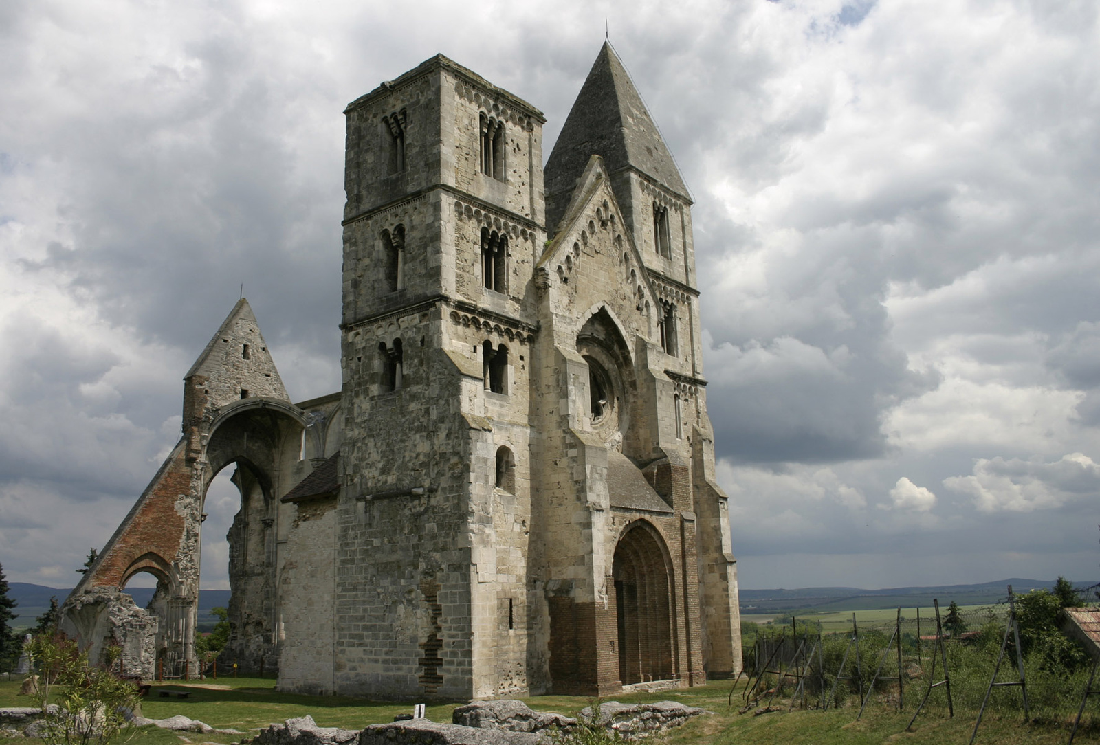 Premontrei prépostsági templom romja (Zsámbék, Régi templom u.) This is a photo of a monument in Hungary. Identifier: 7623